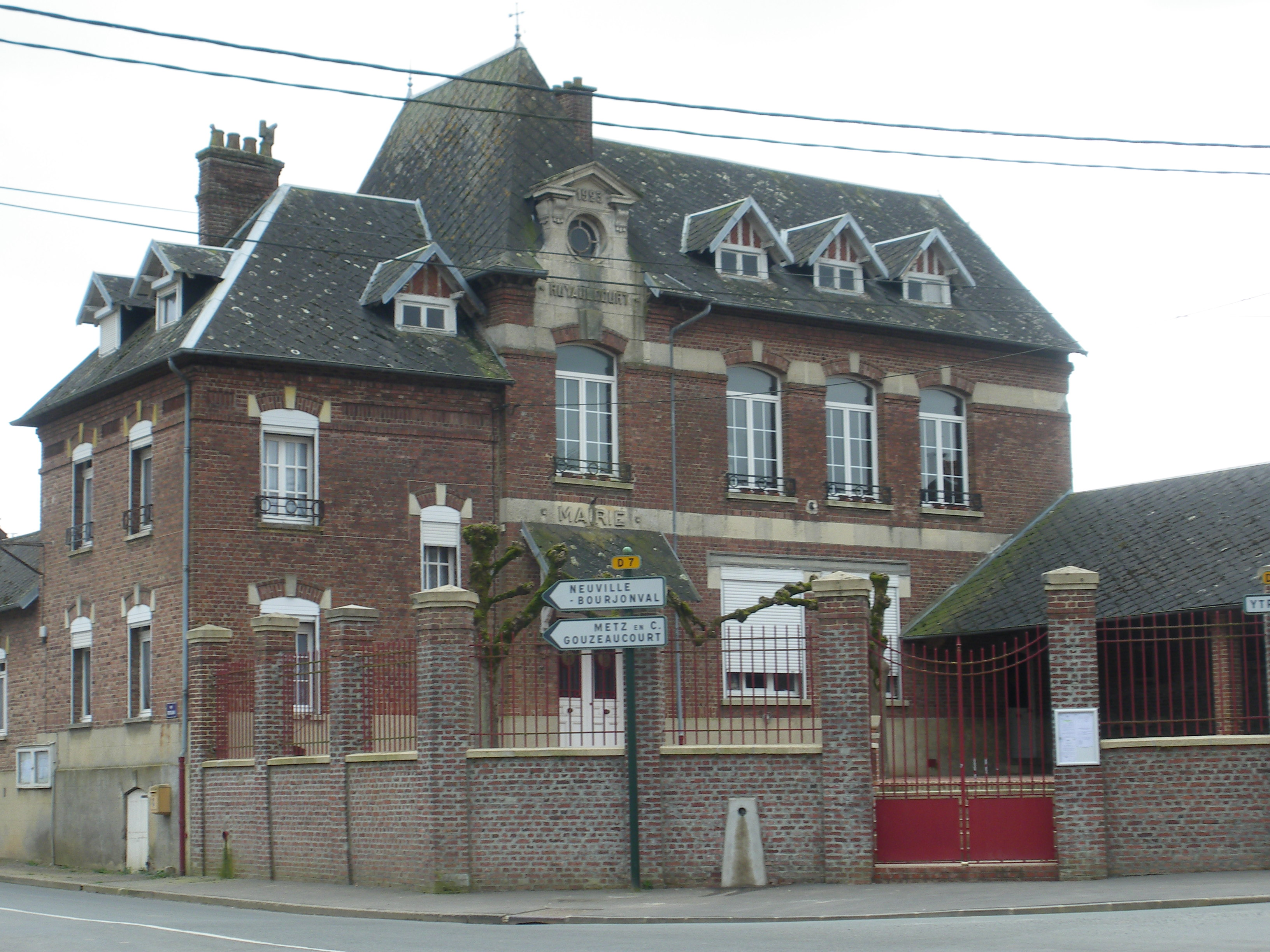 Vue de la mairie de Ruyaulcourt.